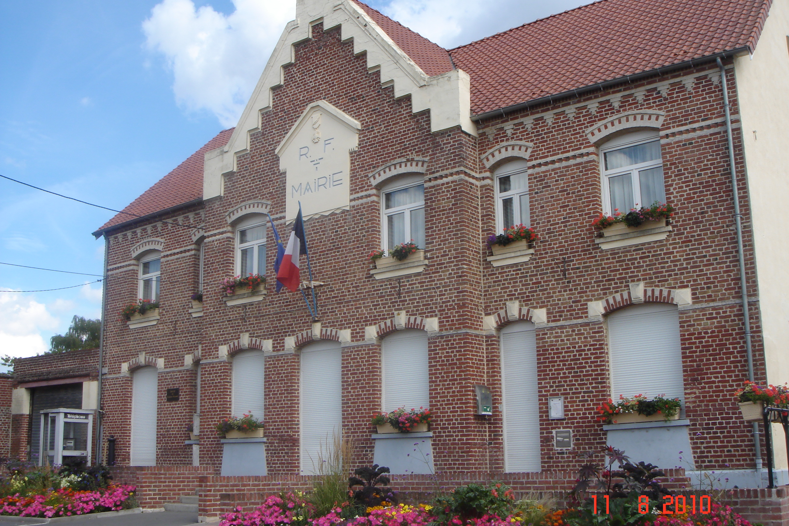 Mairie de Gœulzin - département du Nord - France